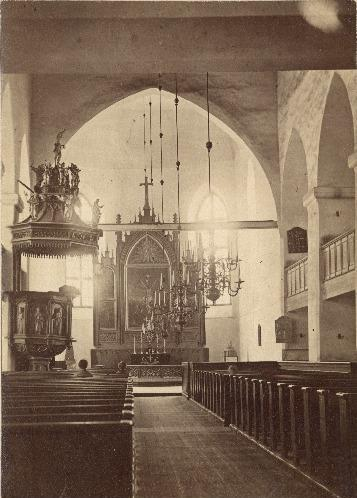 Tartu Jaani kiriku interjöör 1901. aastal